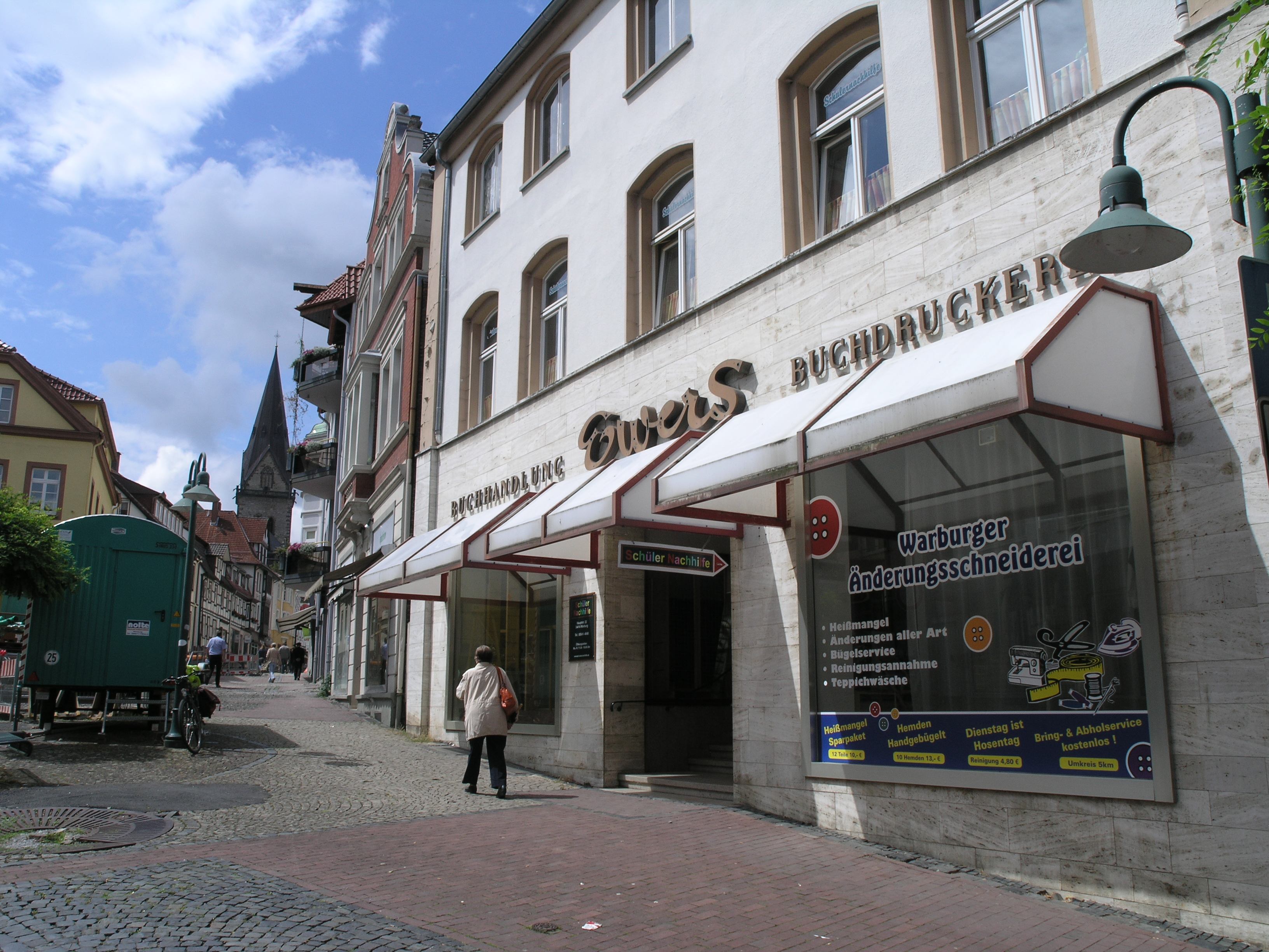 Warburg, Hauptstraße